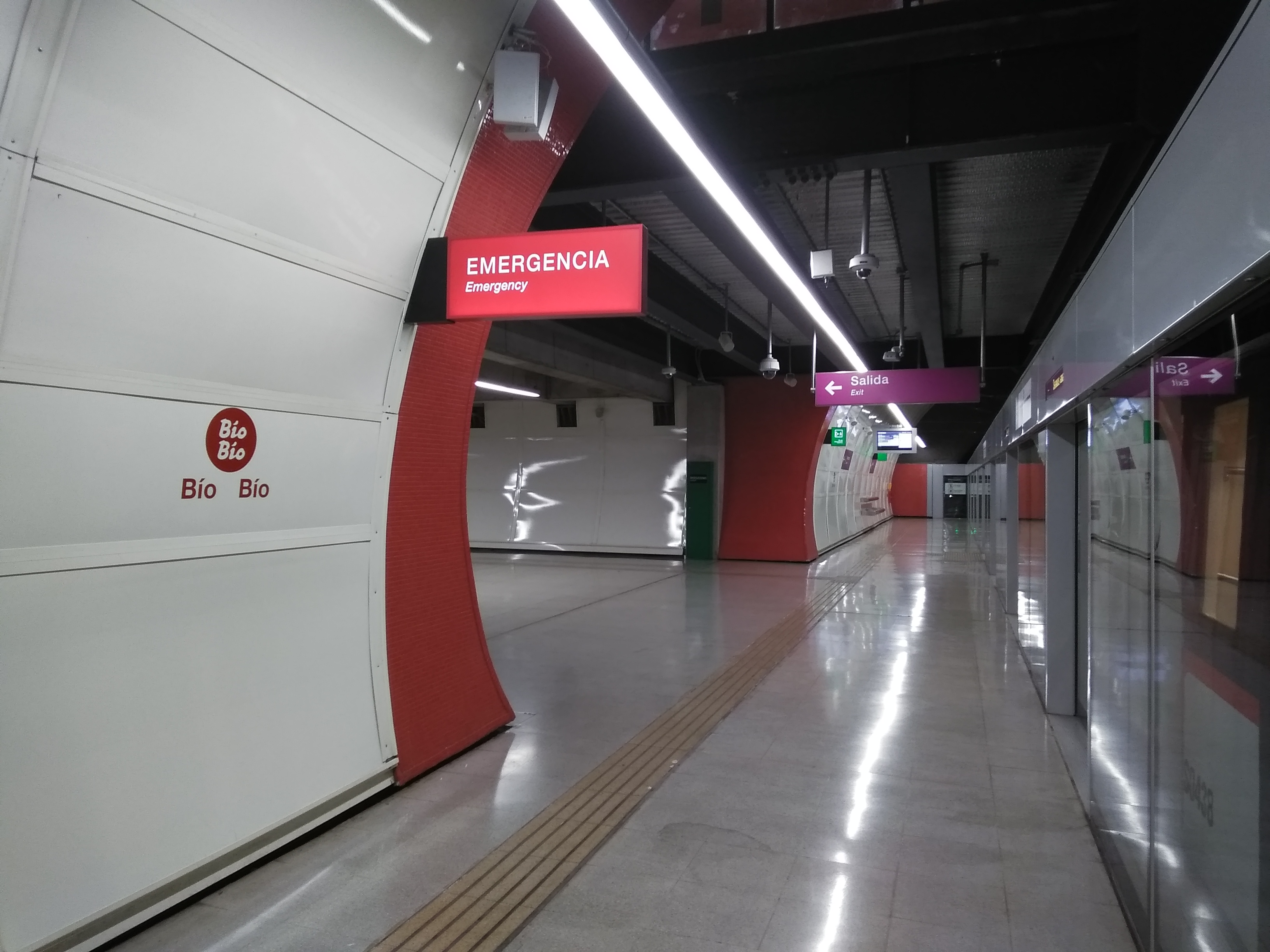 Andén dirección Los Leones en la estación Bío Bío del Metro de Santiago.